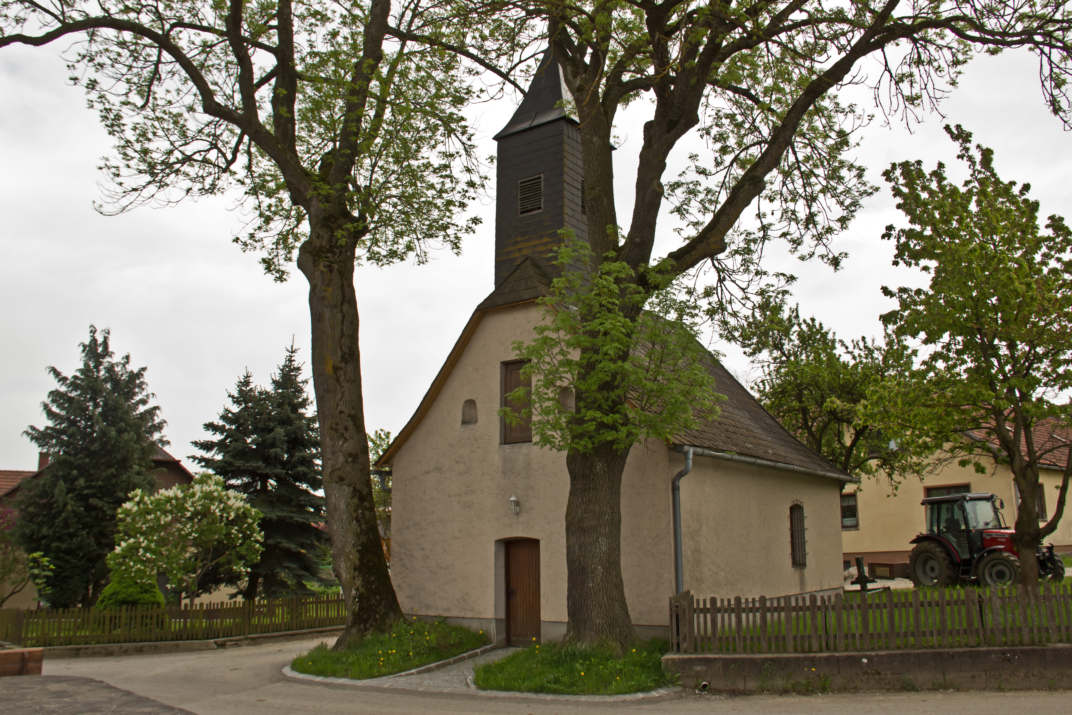 Schlichte Kapelle mit eingezogener Rundapsis. Dachreiter mit Pyramidenhelm. Innen spätgotische und barocke Heiligenfiguren.